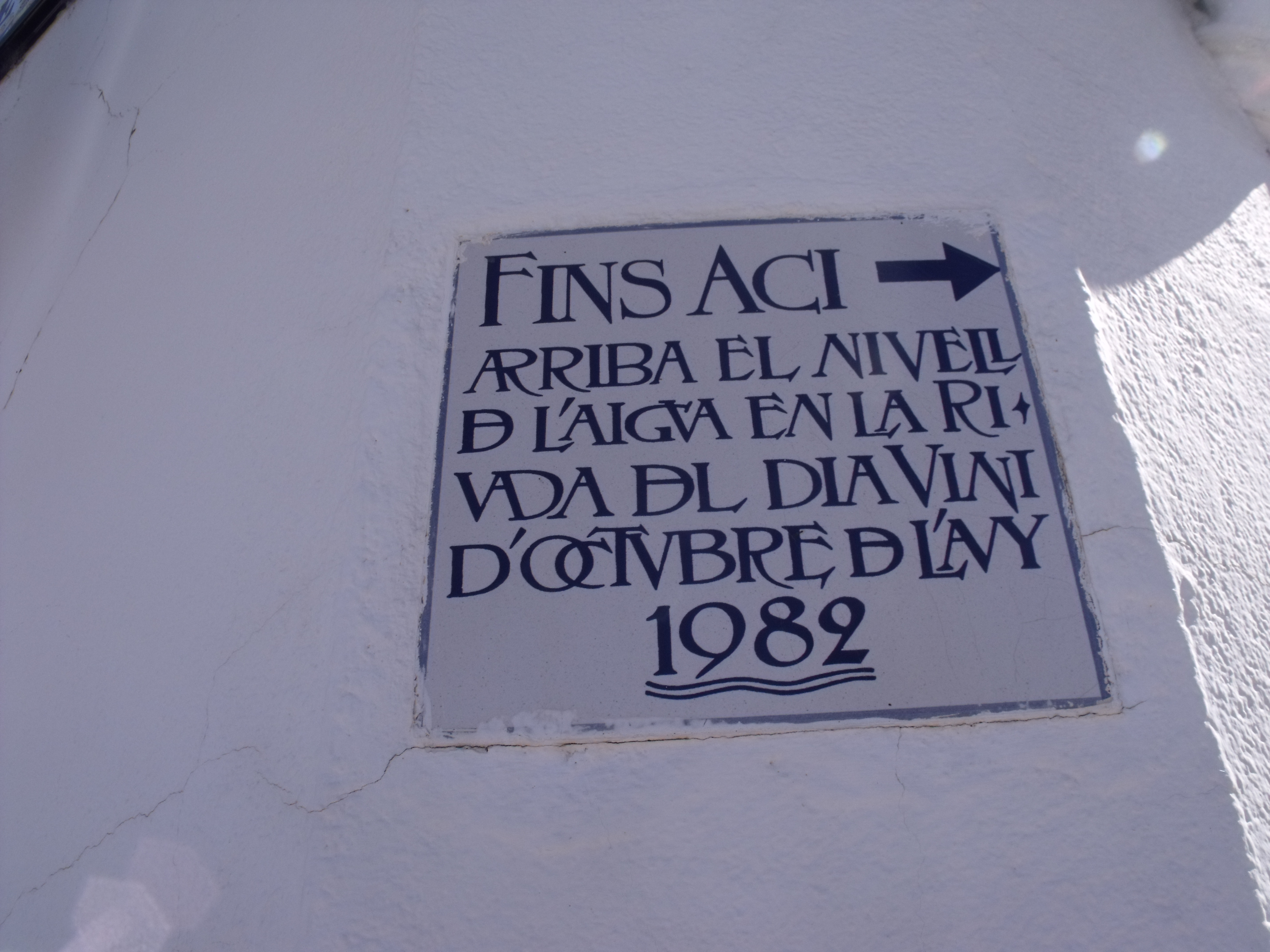 cartel del nivel de las aguas en una de las riadas